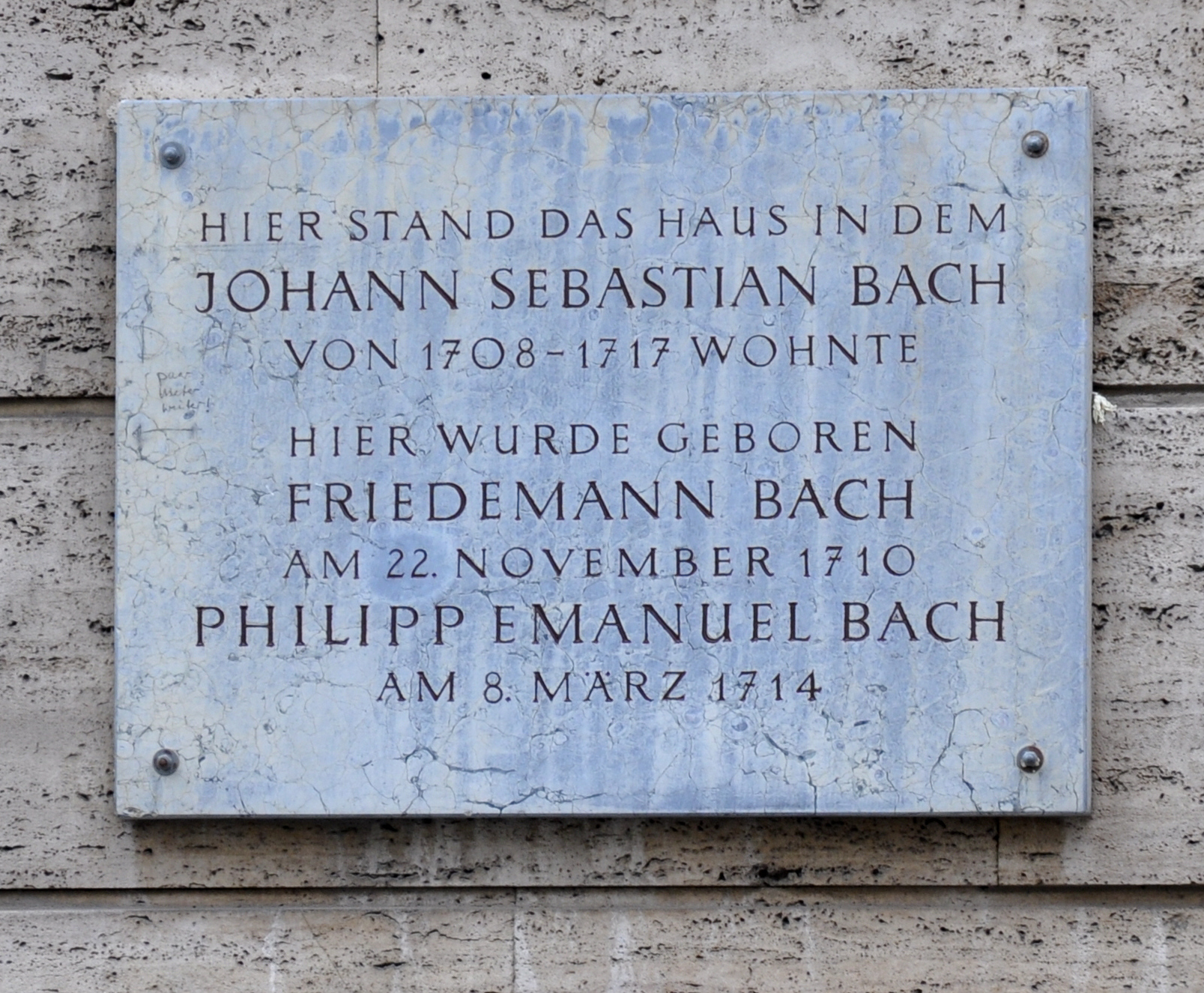 Weimar, Gedenktafel an der Mauer anstelle des Bachhauses Markt 18